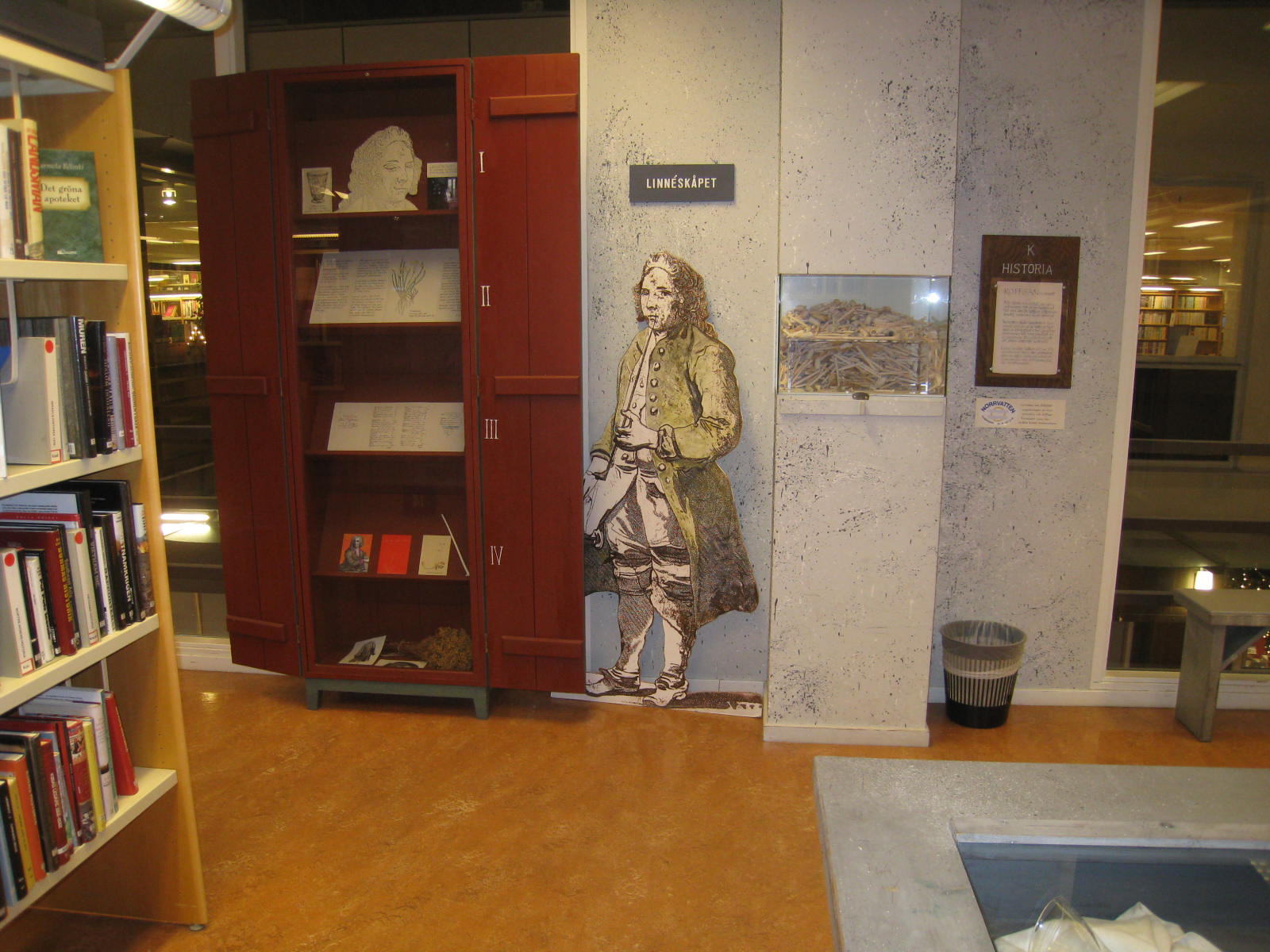 Koffsanmuseet på Jakobsbergs bibliotek i Järfälla kommun.